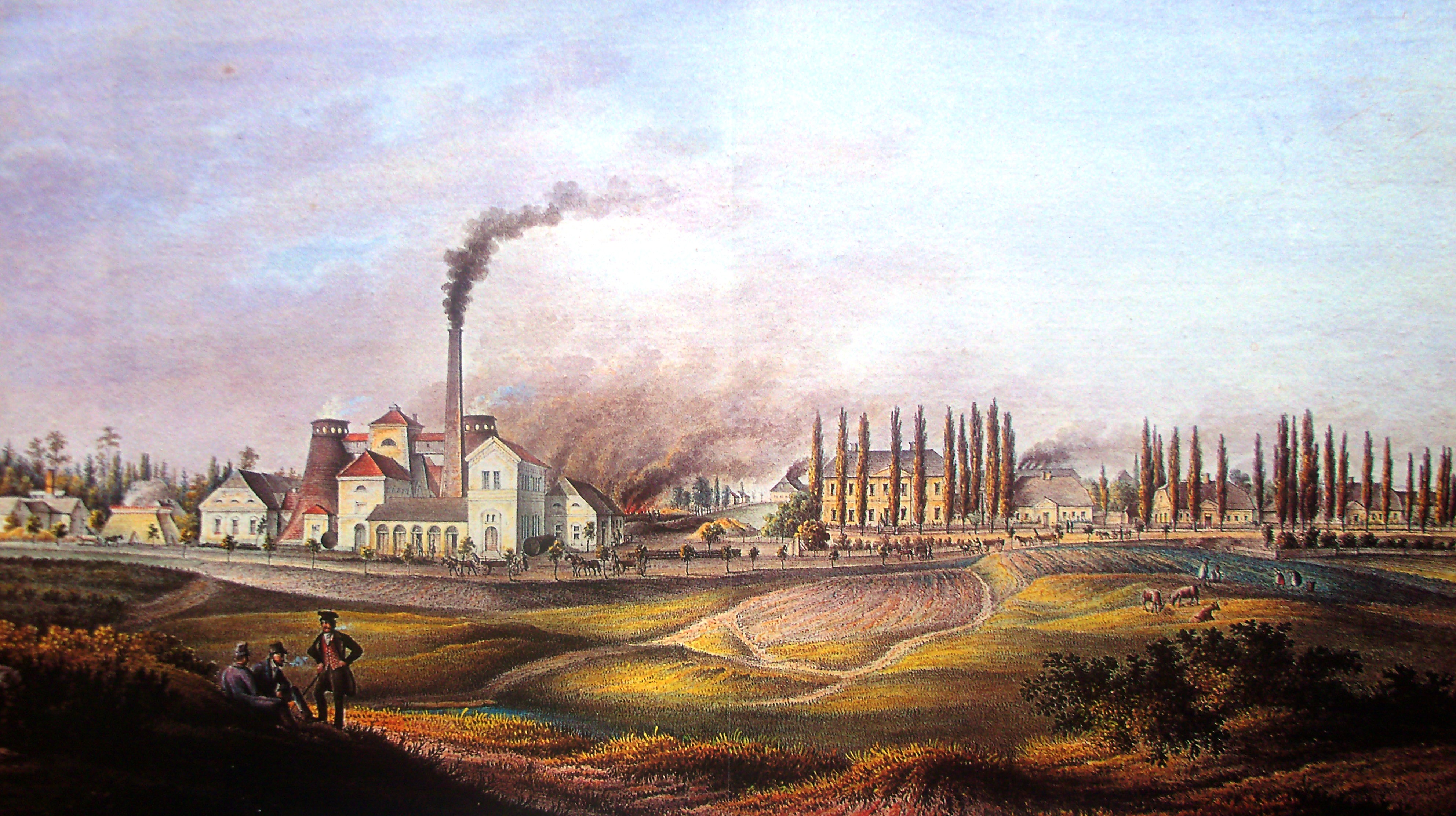 Huta Hohenlohe na Wełnowcu. Litografia Ernesta Knippla (połowa XIX wieku)